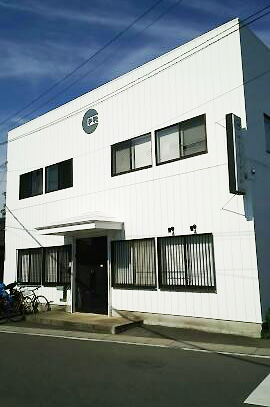 株式会社CPR本社棟